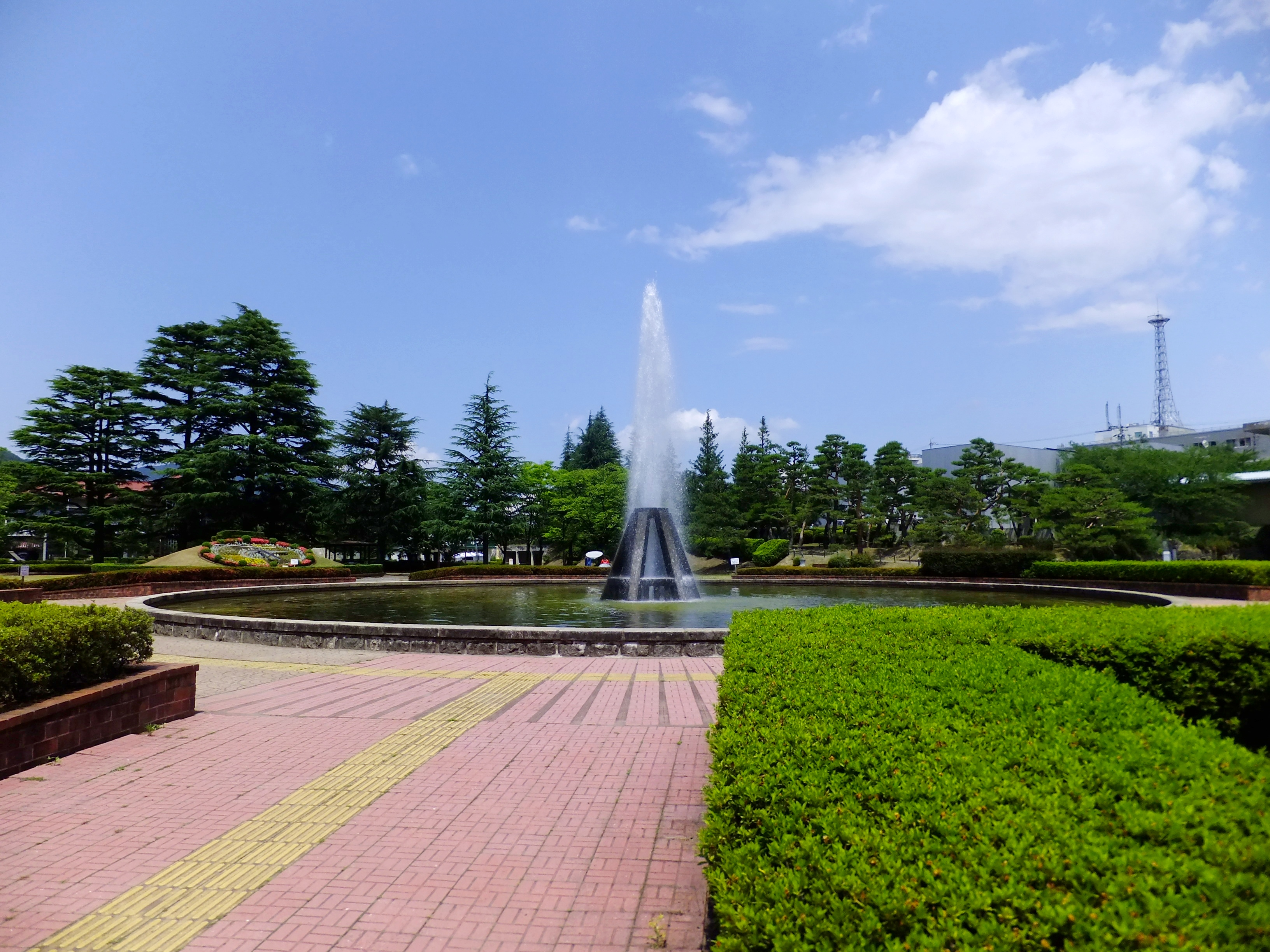 長野市の城山（じょうやま）公園。善光寺の東隣にあり、園内には長野県信濃美術館等がある。